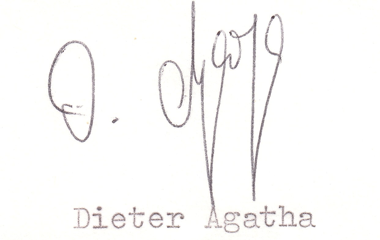 Autogramm des ehem. Profifußballspielers von 1978